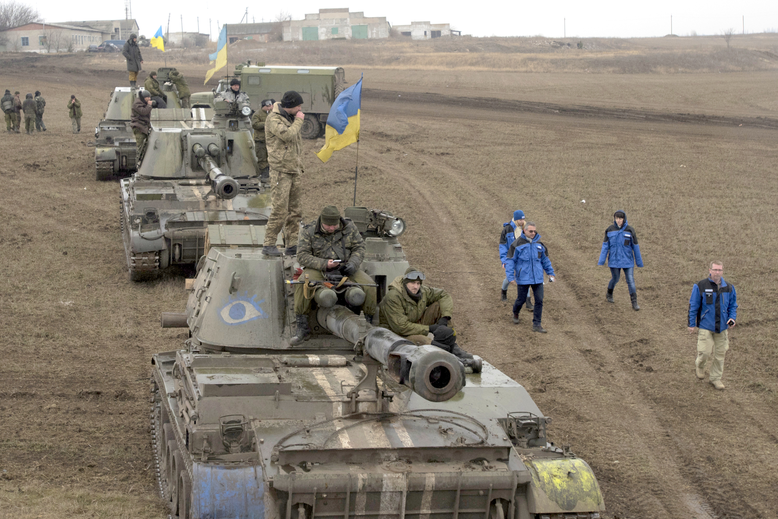 March, 2015